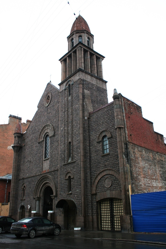 Kośćiół Matki Boskiej z Lourdes w St. Petersburgu